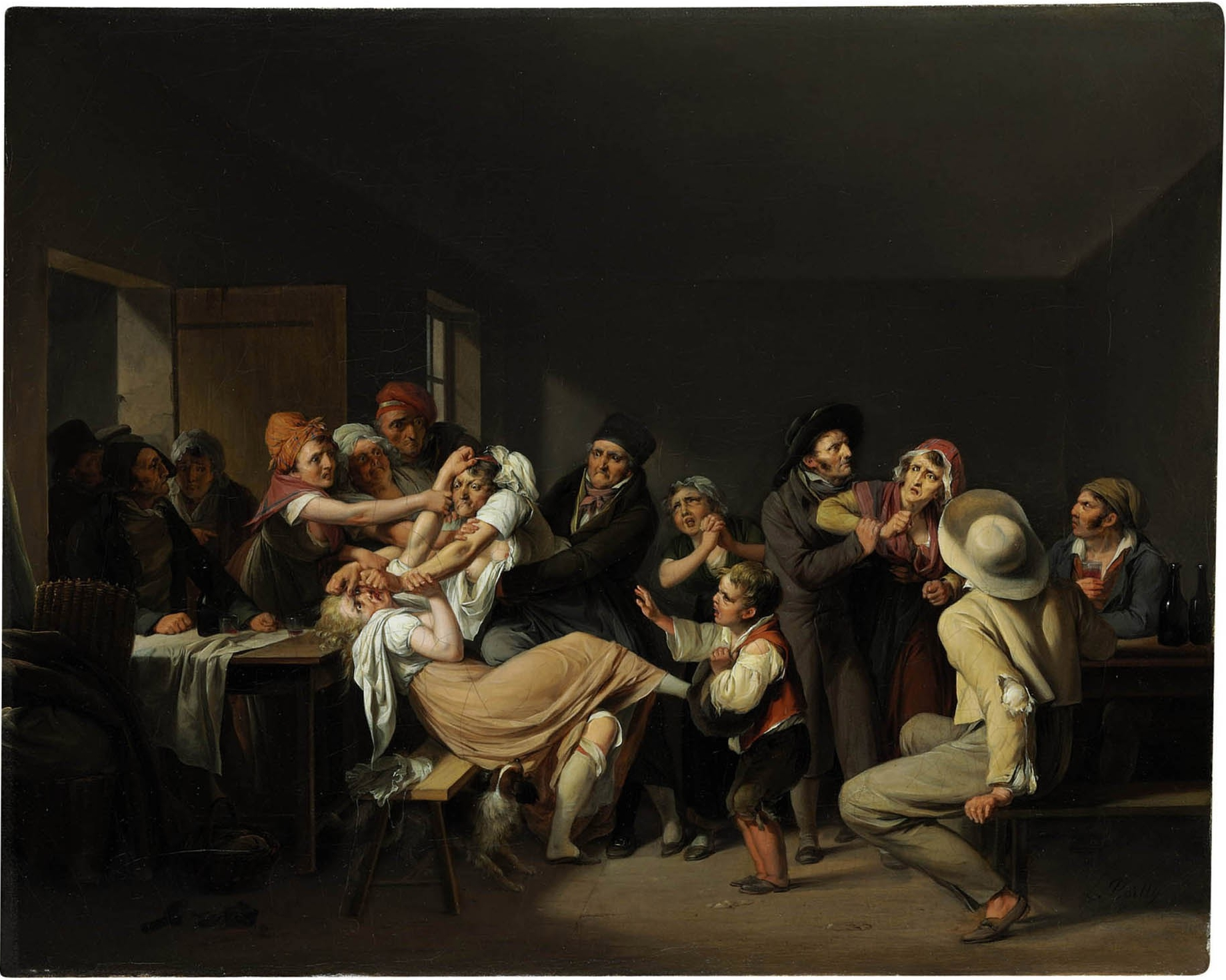 Une paire de peintures Les Femmes se battent Les Hommes se disputent